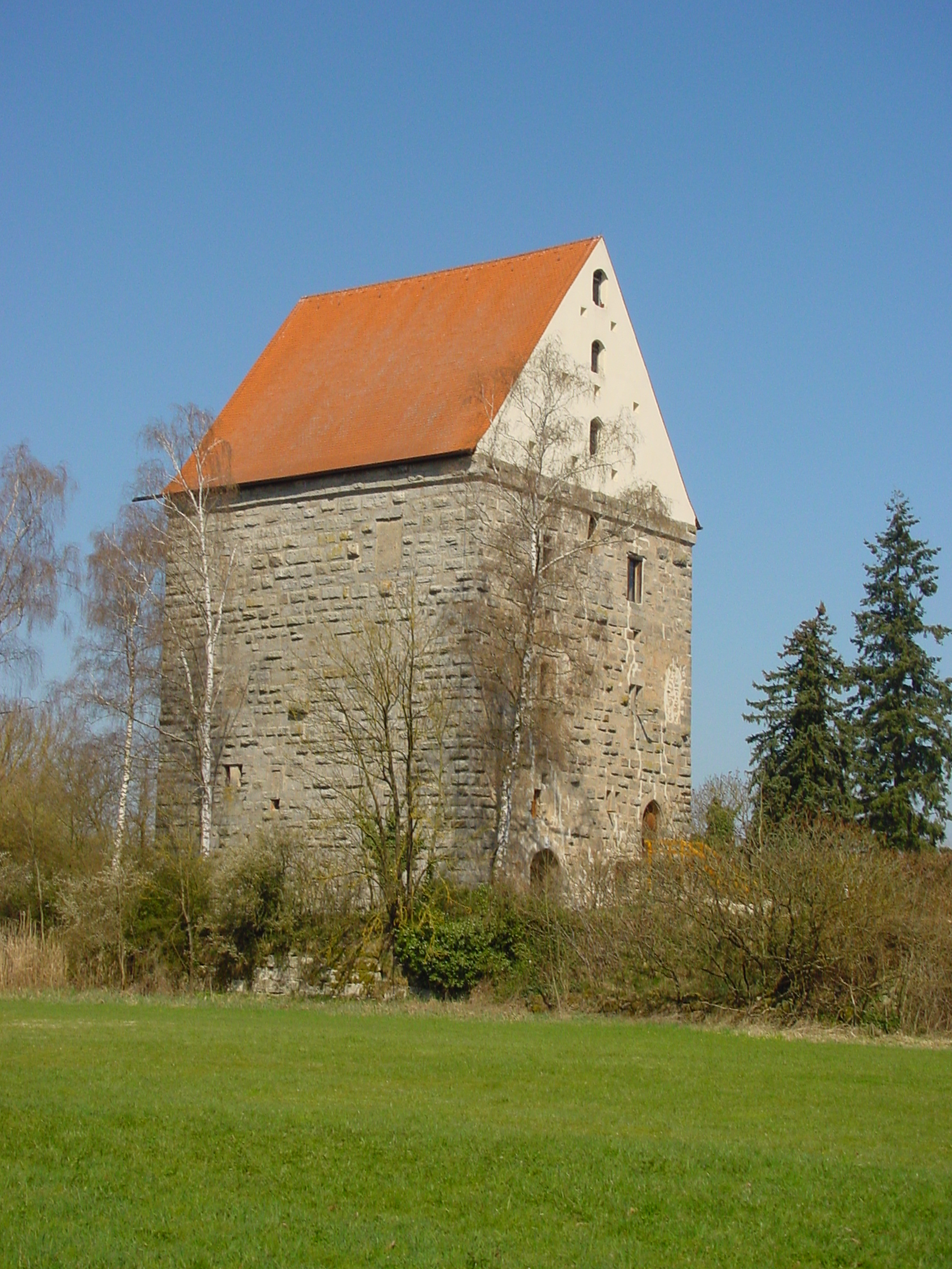 Wohnturm Südostseite